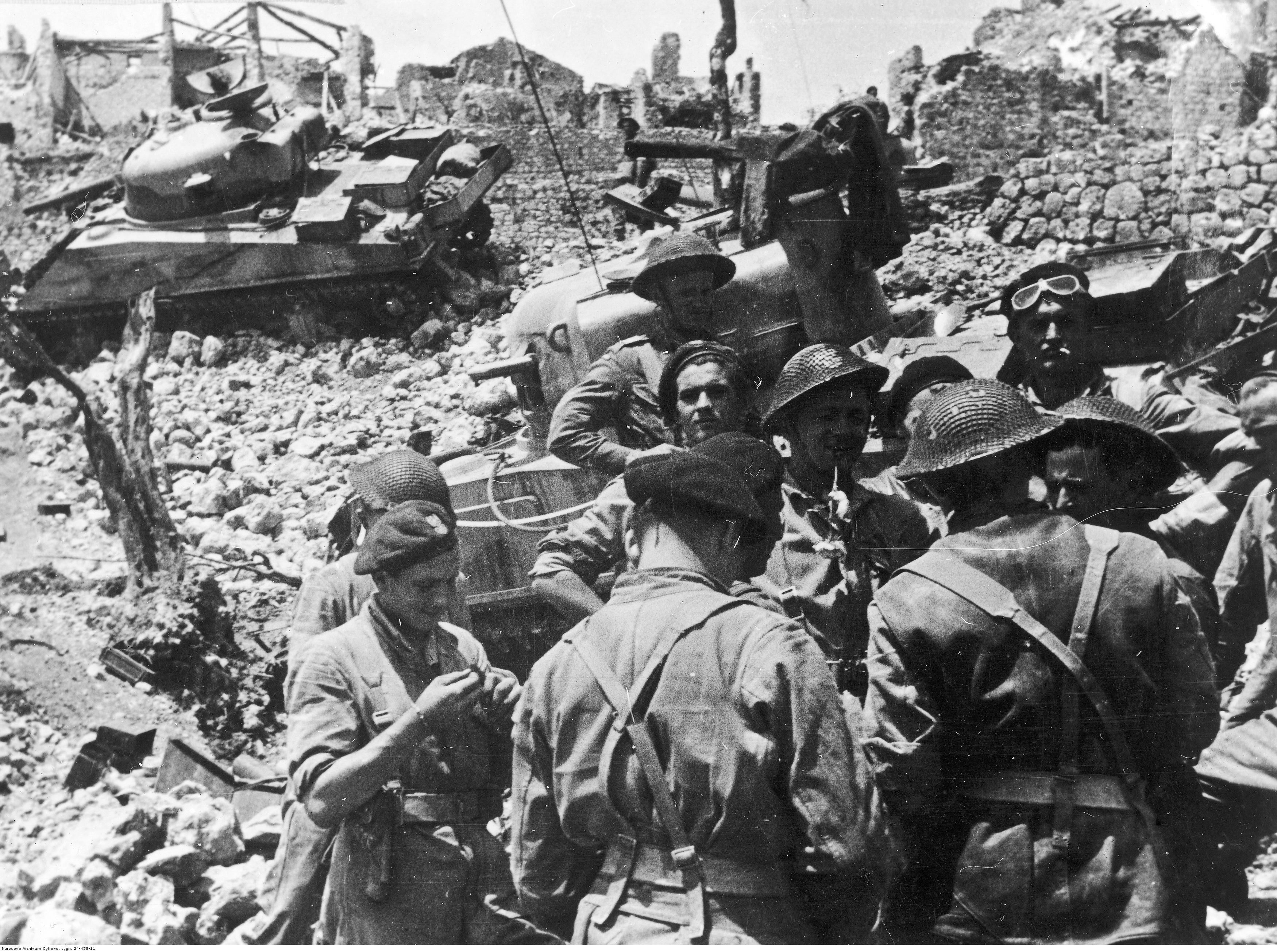 Zdobycie Piedimonte - żołnierze z 6 Pułku Pancernego "Dzieci Lwowskich" z 2 Korpusu Polskiego ze swoimi czołgami M4 Sherman wśród ruin na wzgórzu Maiola; 25 maja 1944. Archiwum Fotograficzne Tadeusza Szumańskiego. Sygnatura: 24-458-11